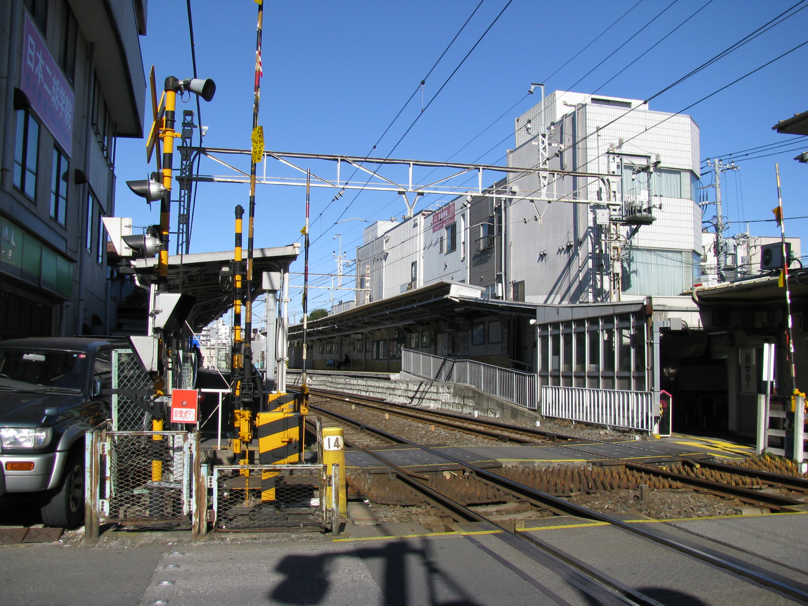 東武亀戸線東あずま駅